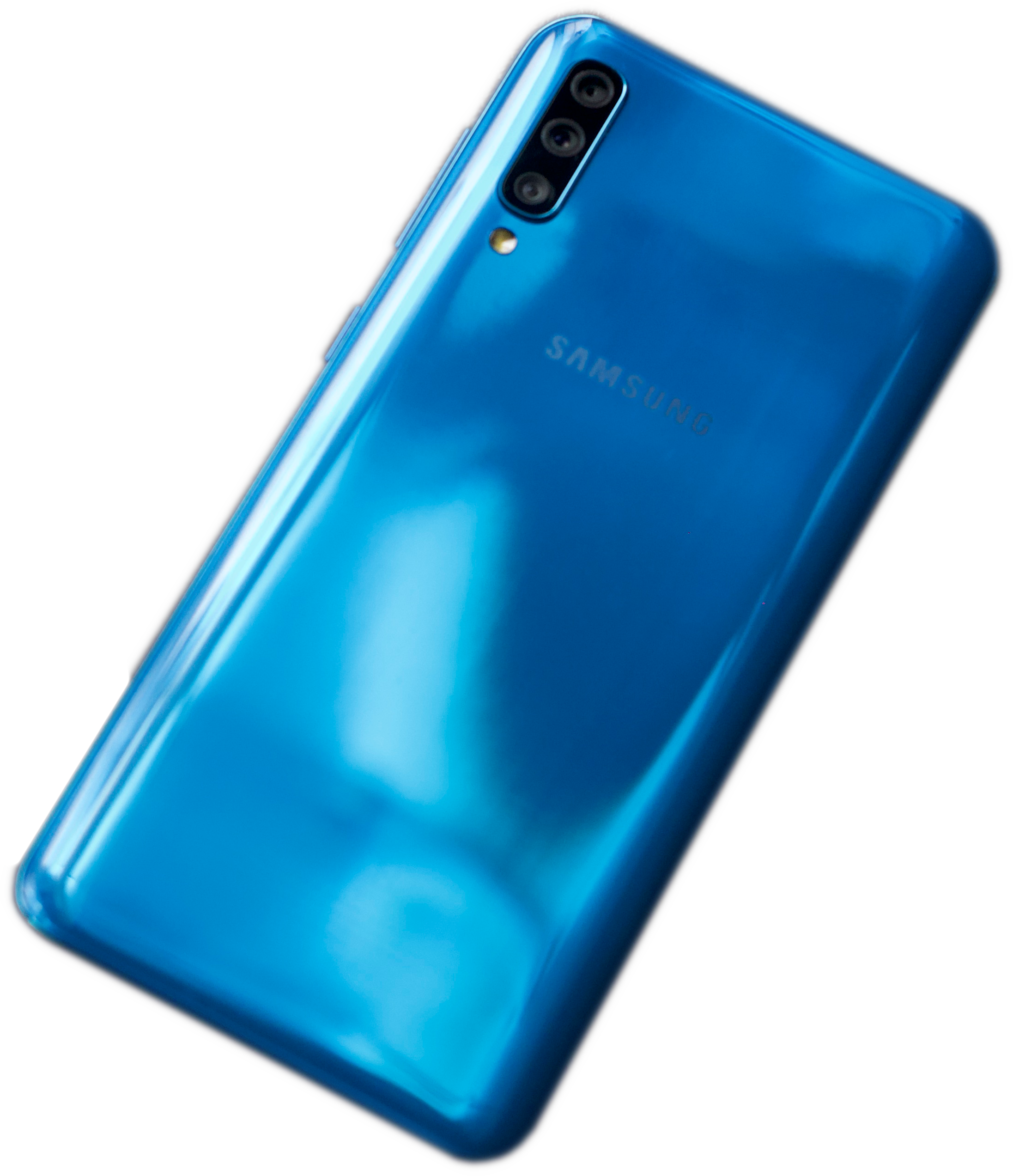 Dos du Galaxy A 50